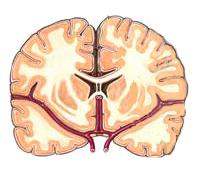 Arteria Cerebral